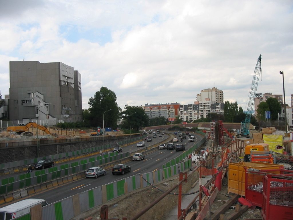 Travaux de couverture de la Porte des Lilas à Paris. je suis l'auteur du cliché pris à la rentrée 2005